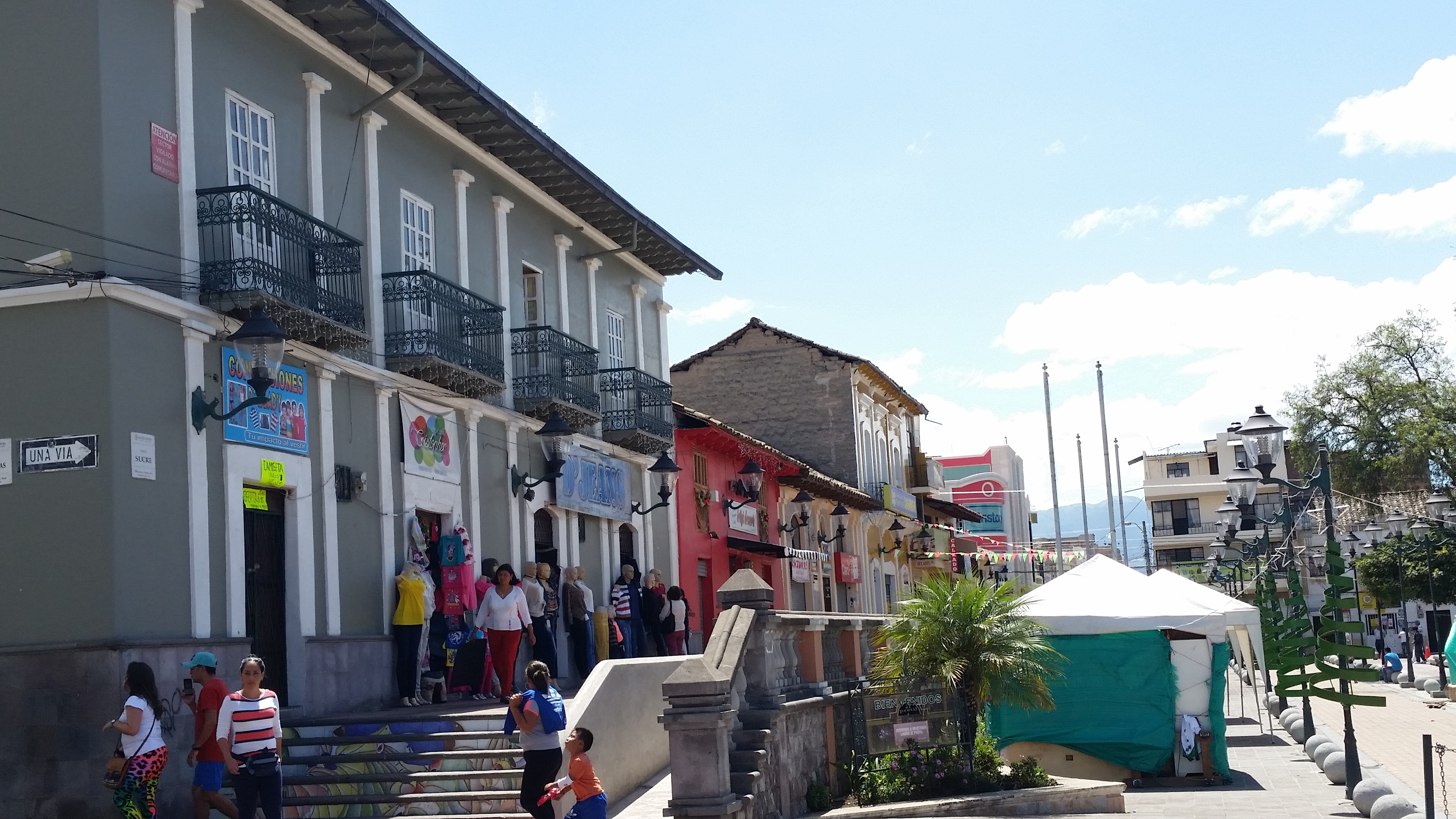 Parque Central "Antonio José de Sucre", Atuntaqui (Provincia de Imbabura)